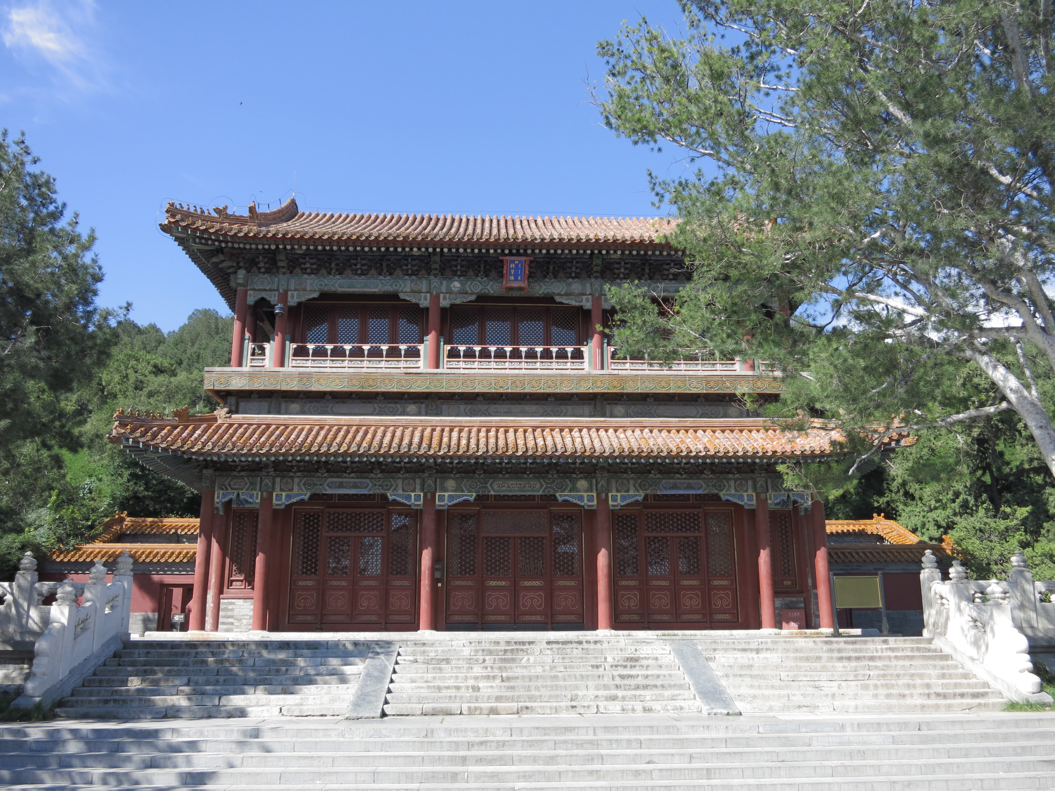 北京景山公園的倚望樓